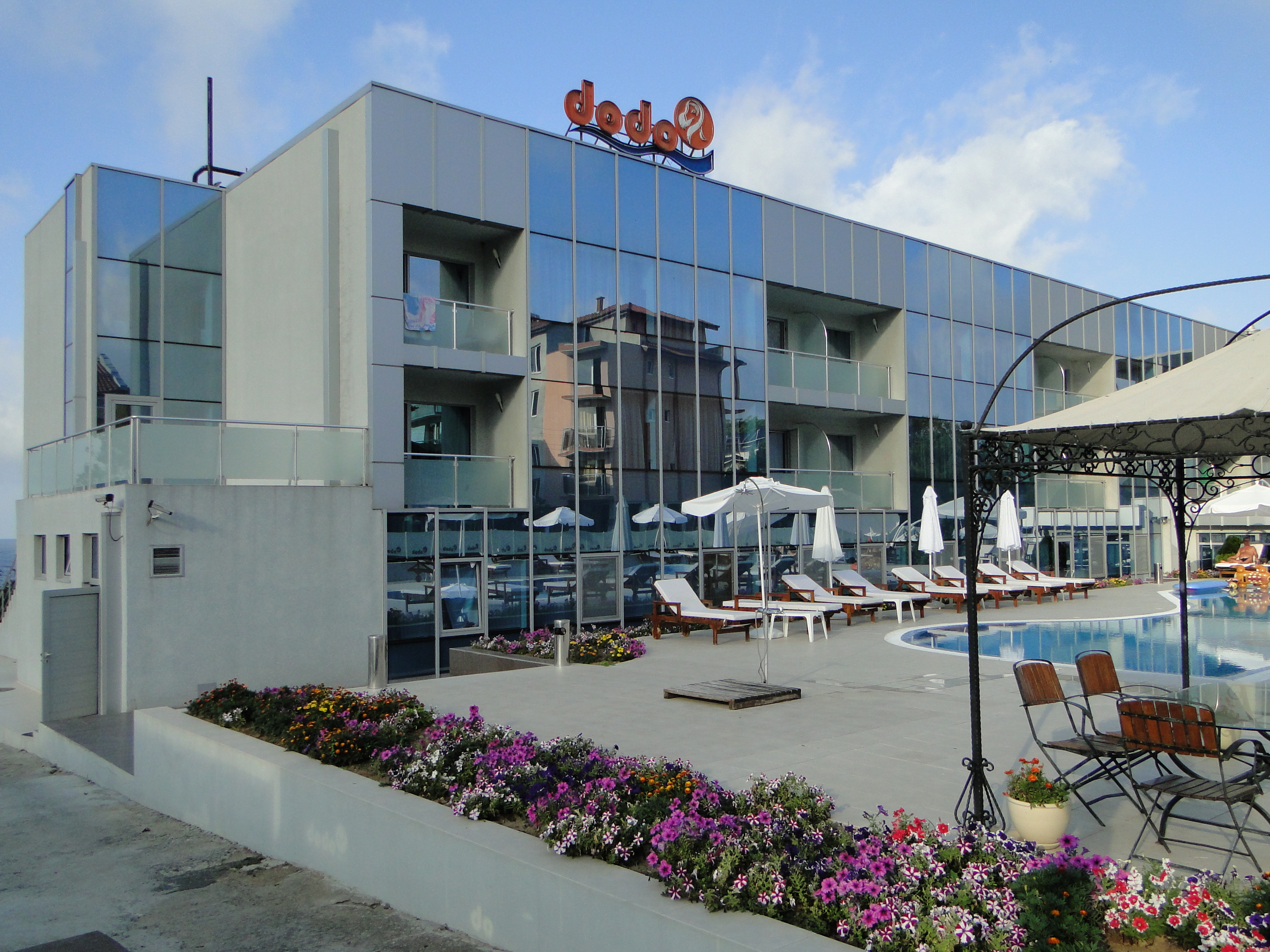 Китен Bulgaria